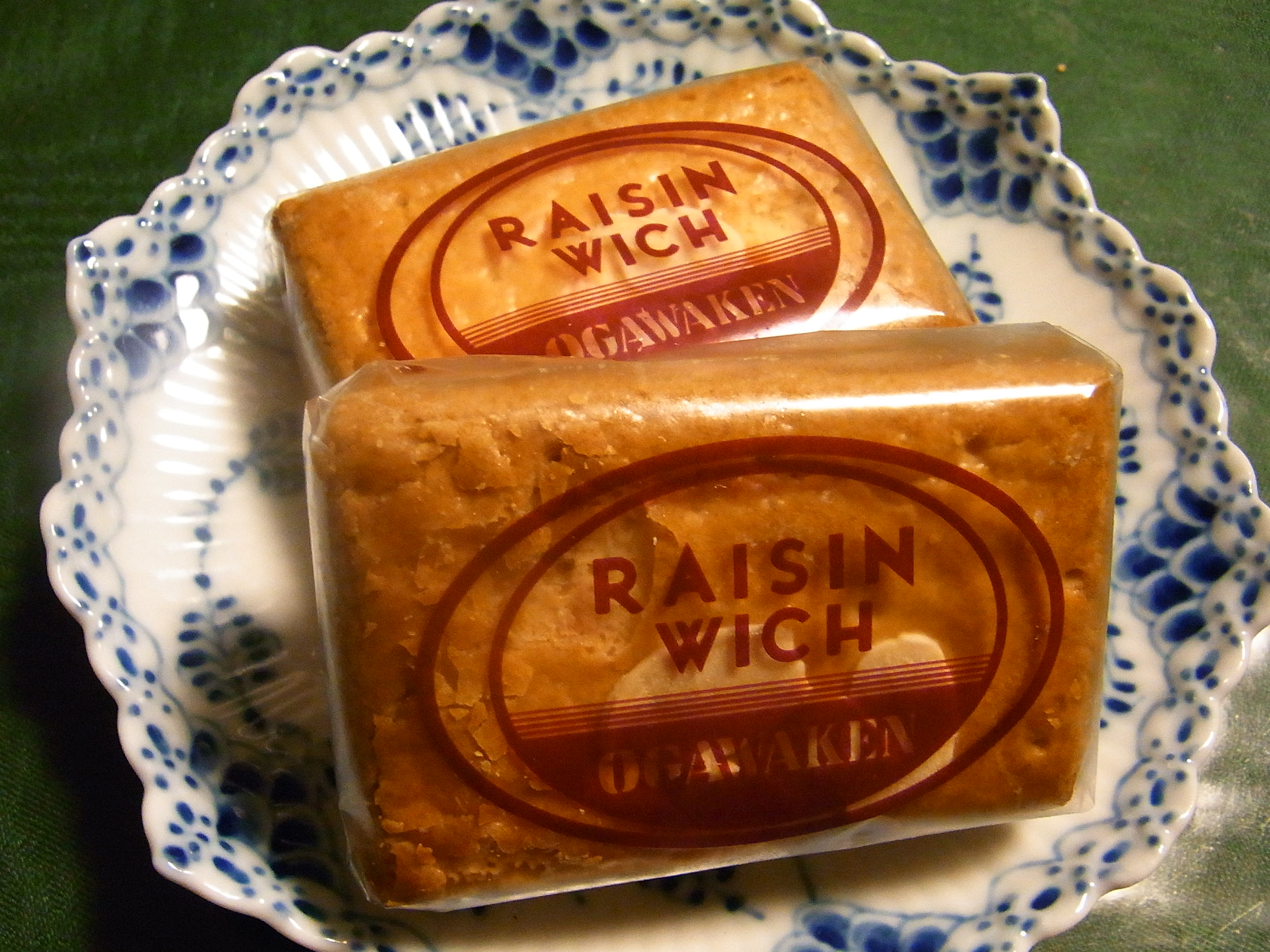 小川軒 レイズンウィッチ